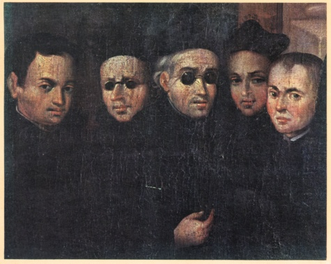 Jesuitas en el Cuzco (detalle de Serie del Corpus Christi)